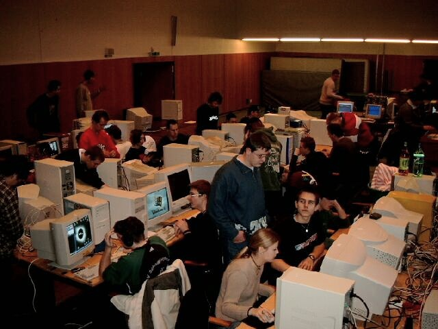 Fotoausschnitt einer mittelgroßen LAN-Party